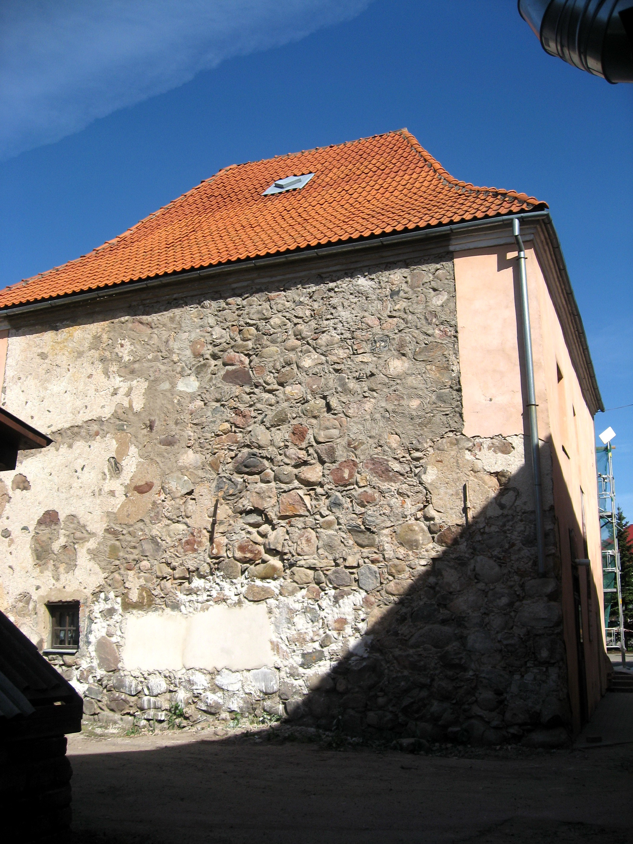 Tukums, hradní věž